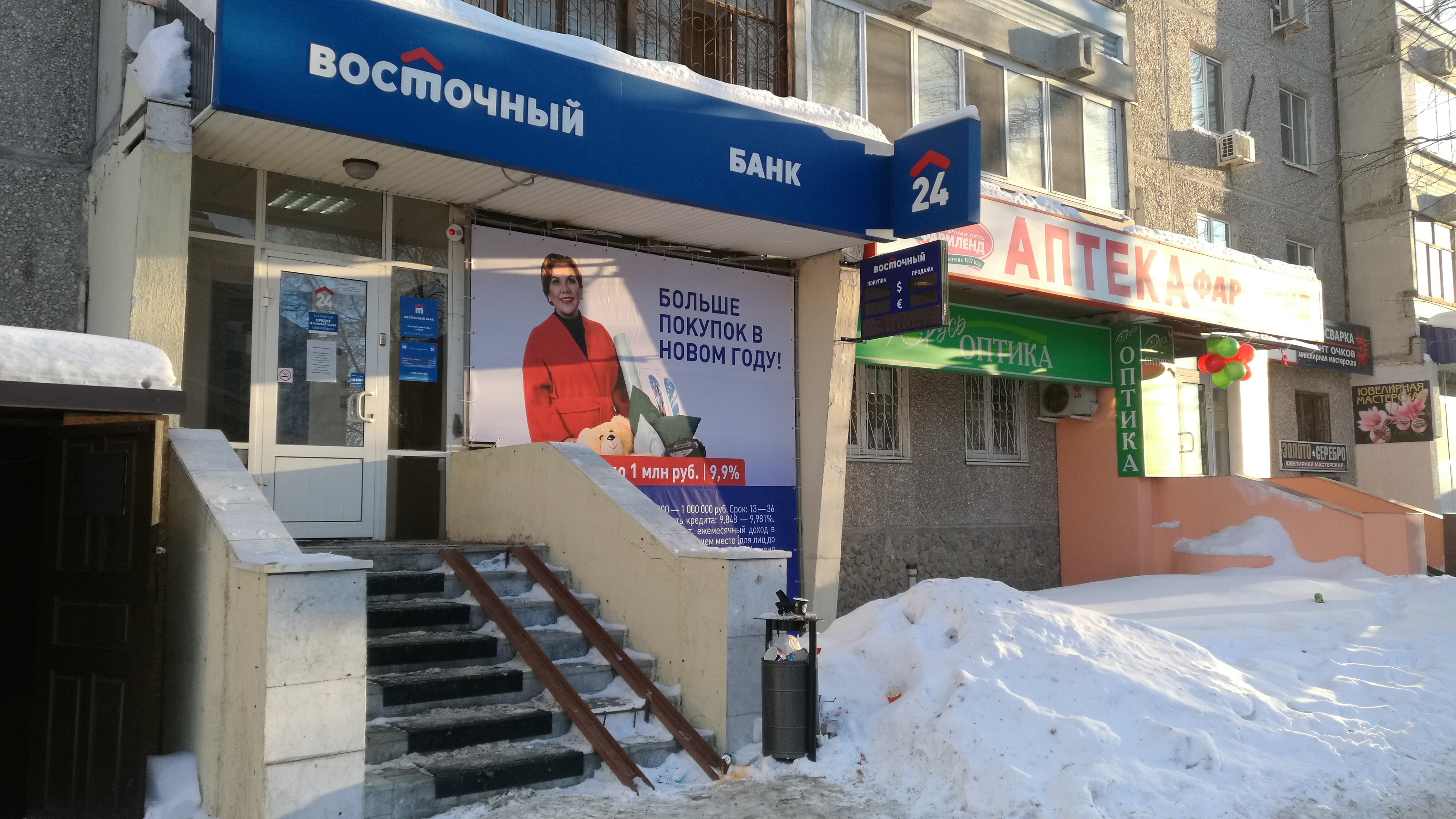 Banko kaj apoteko en loĝdomo en strato Fabriĉnaja, 1. Tjumeno, Rusio.